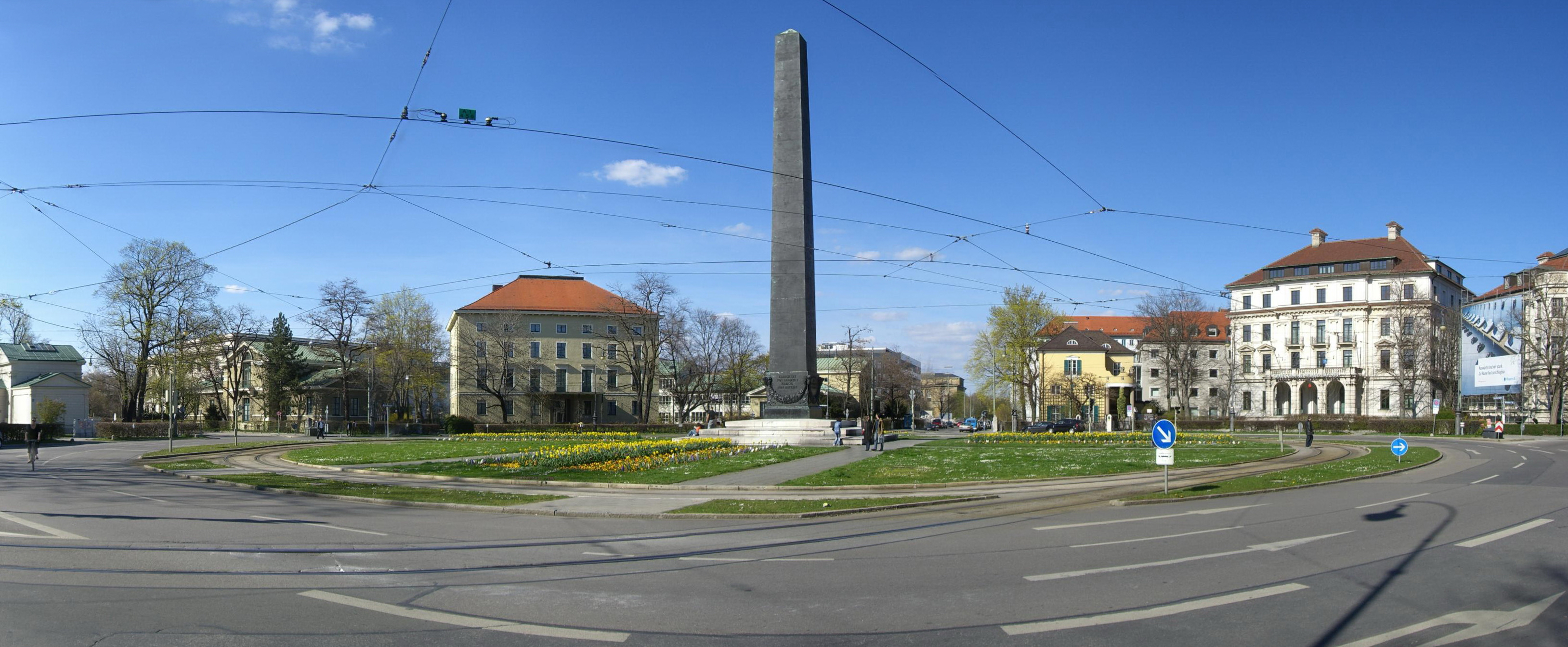 München: Karolinenplatz (Panorama)